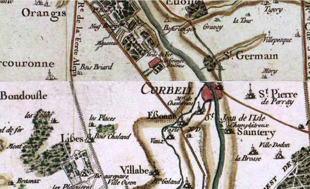 Carte de la région de Corbeil au XVIIe siècle par Cassini